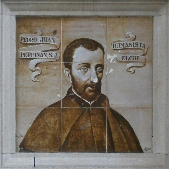 Retrato de Pedro Juan Perpiñán. Jardín de las Celebridades, Diputación de Alicante, España.